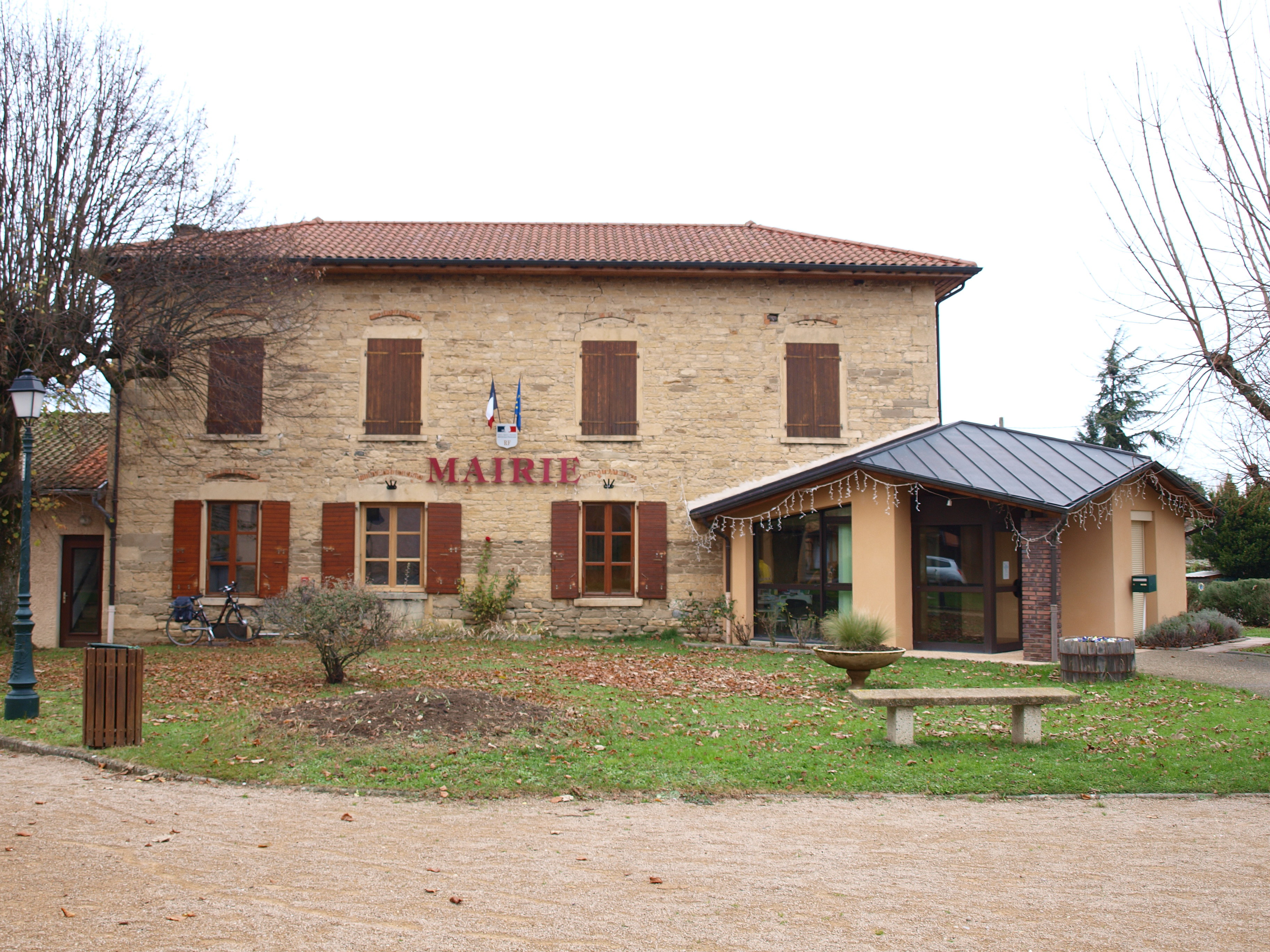 Meyrié (Isére, France)